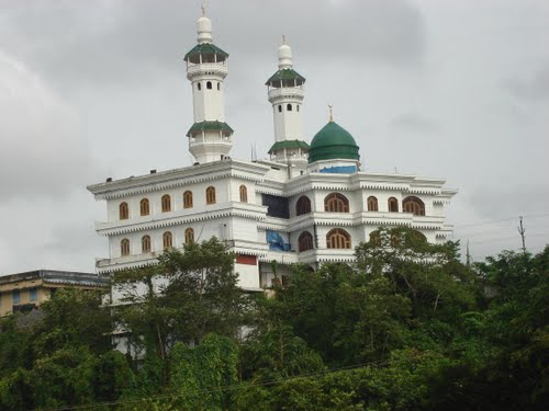 തിരൂരങ്ങാടി വലിയ ജുമാ മസ്ജിദ്